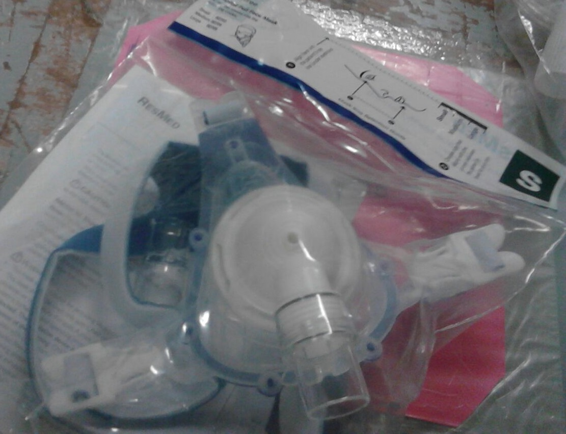 Mascarilla que se utiliza en la Ventilación Mecánica No Invasiva